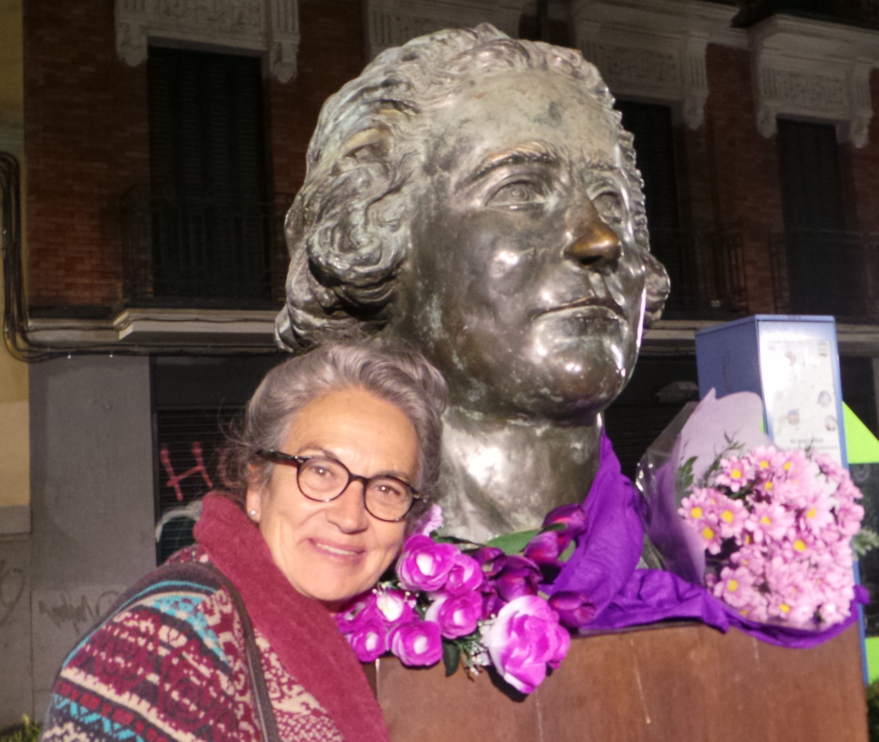 Homenaje a Clara Campoamor. Madrid. Visperas de la marcha 7N contra las violencias hacia las mujeres